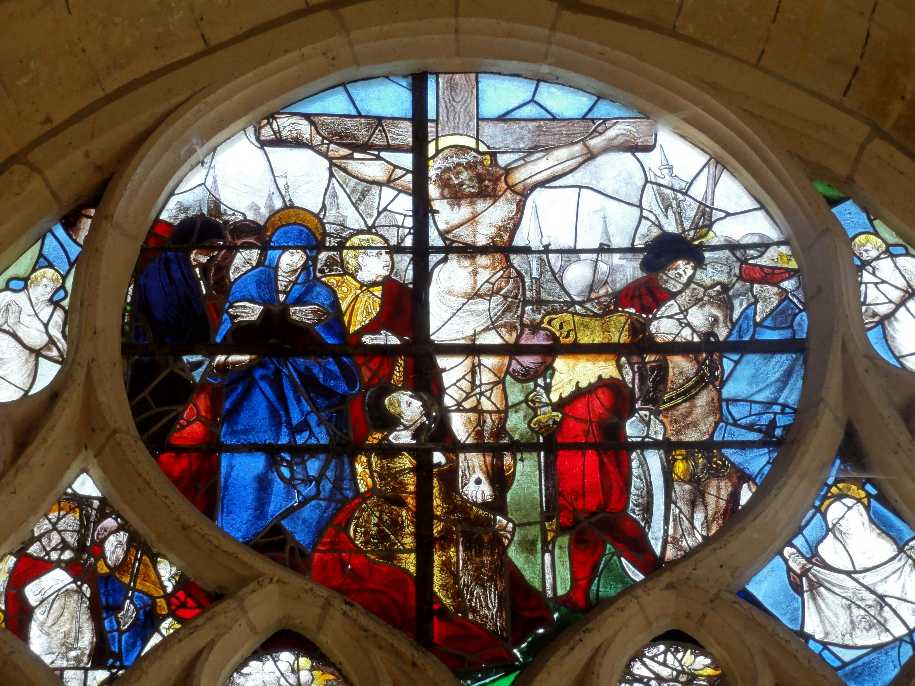 Verrière n° 0 dite de la Passion - voir titre.